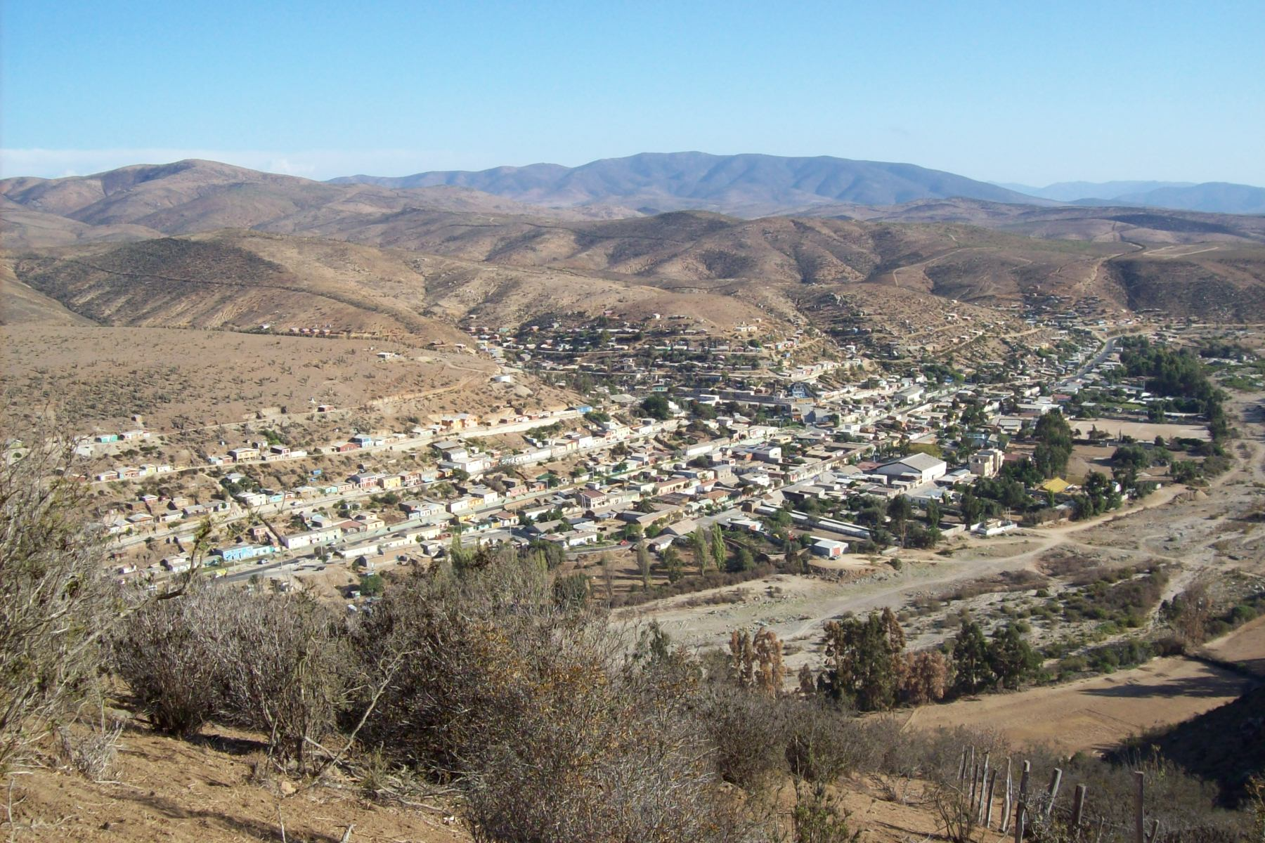 Canela Baja desde la altura